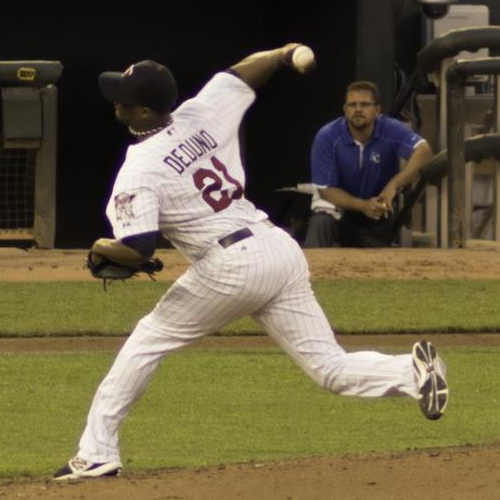 Samuel Deduno